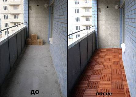 декинг на балконе